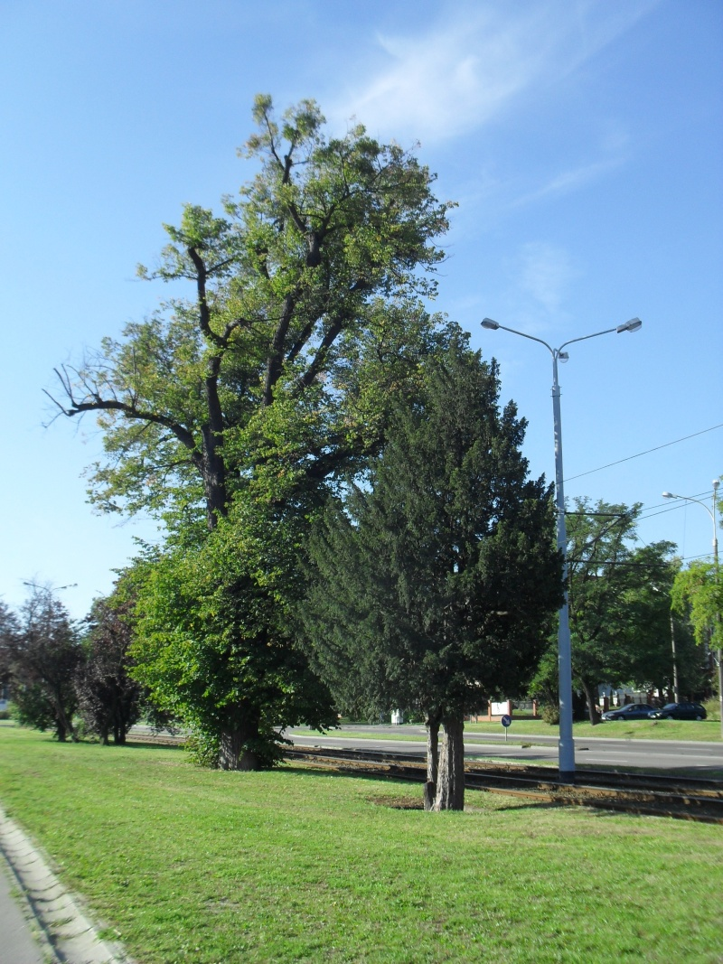 Lipa drobnolistna i cis pospolity przy ul. 3 Maja w Gdańsku, trawnik pomiędzy jezdnią a torowiskiem tramwajowym.